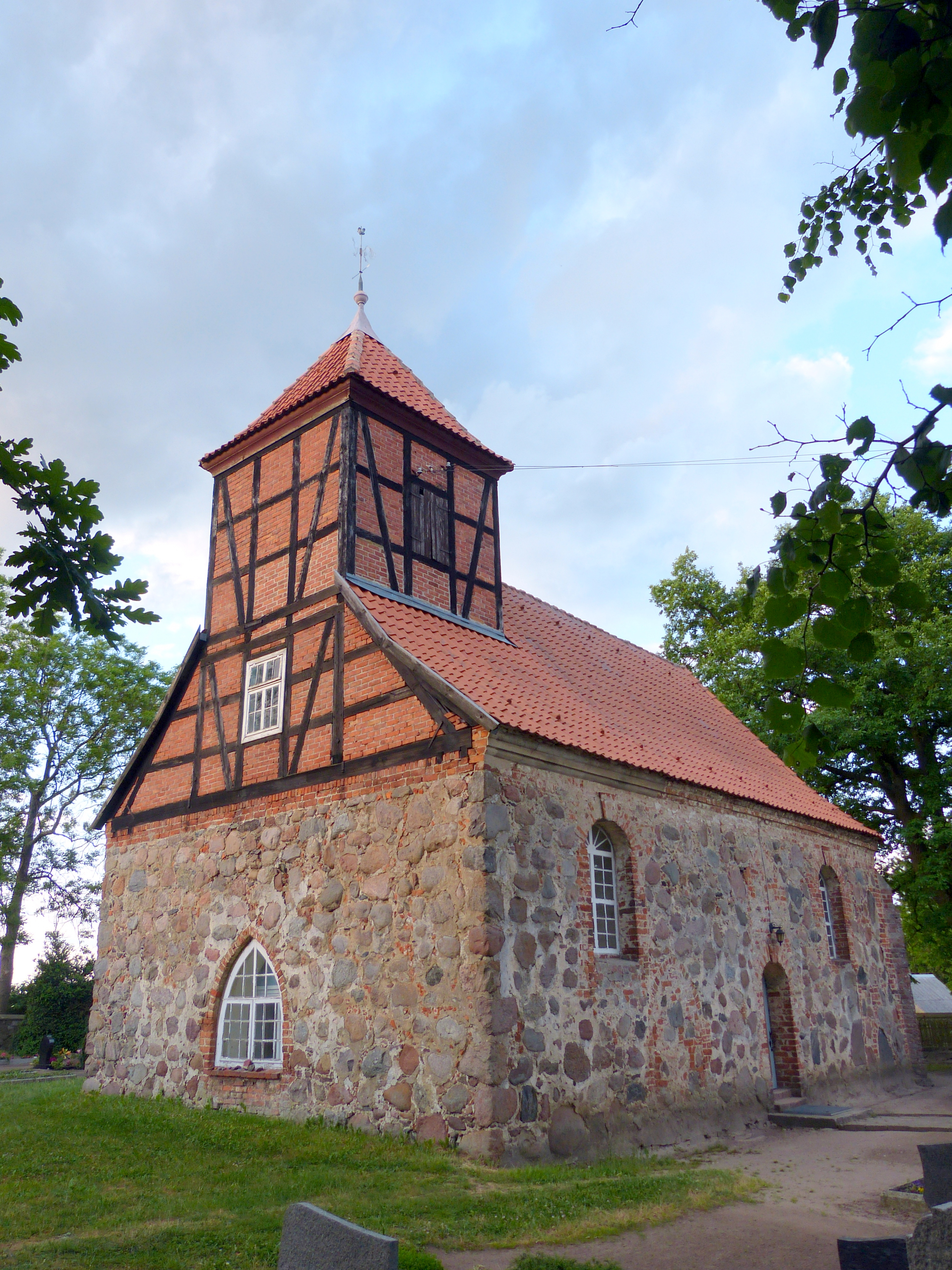 Kirche in Pripsleben, Westgiebel mit Turm und Südseite